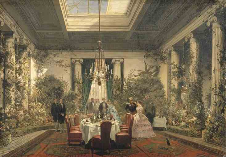 La salle à manger de la Princesse Mathilde, 24 rue de Courcelles (à Paris, VIIIe arrondissement, aujourd'hui n° 10 de ladite rue). Lieu de conservation: Compiègne, Château de Compiègne, Musée du Second Empire.